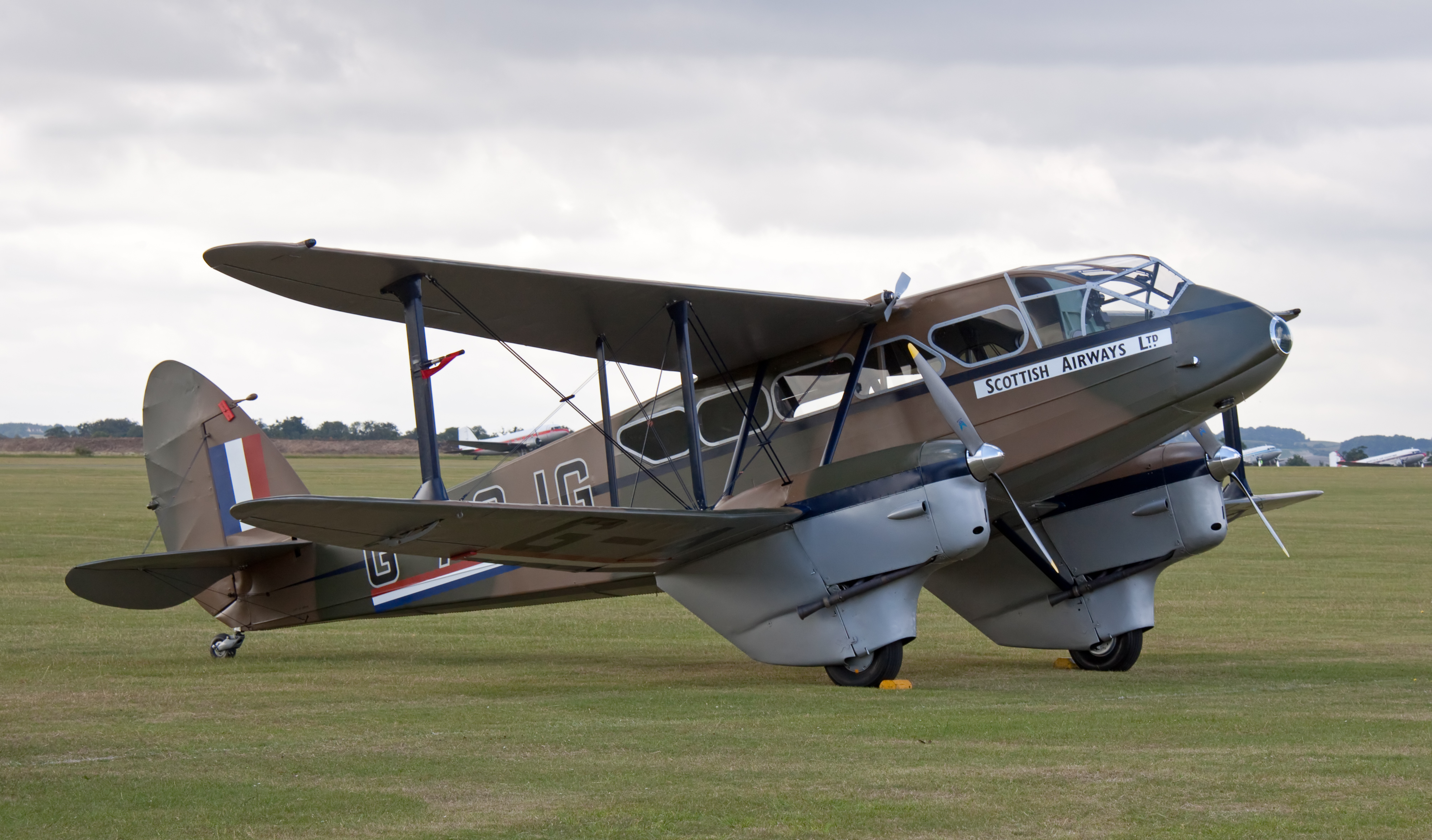 de Havilland DH 89A Dragon Rapide G-AGJG